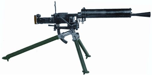 Questa foto rappresenta un'arma della prima guerra mondiale, è in bianco e nero ed è stata scattata durante il conflitto quindi oltre 20 anni fa